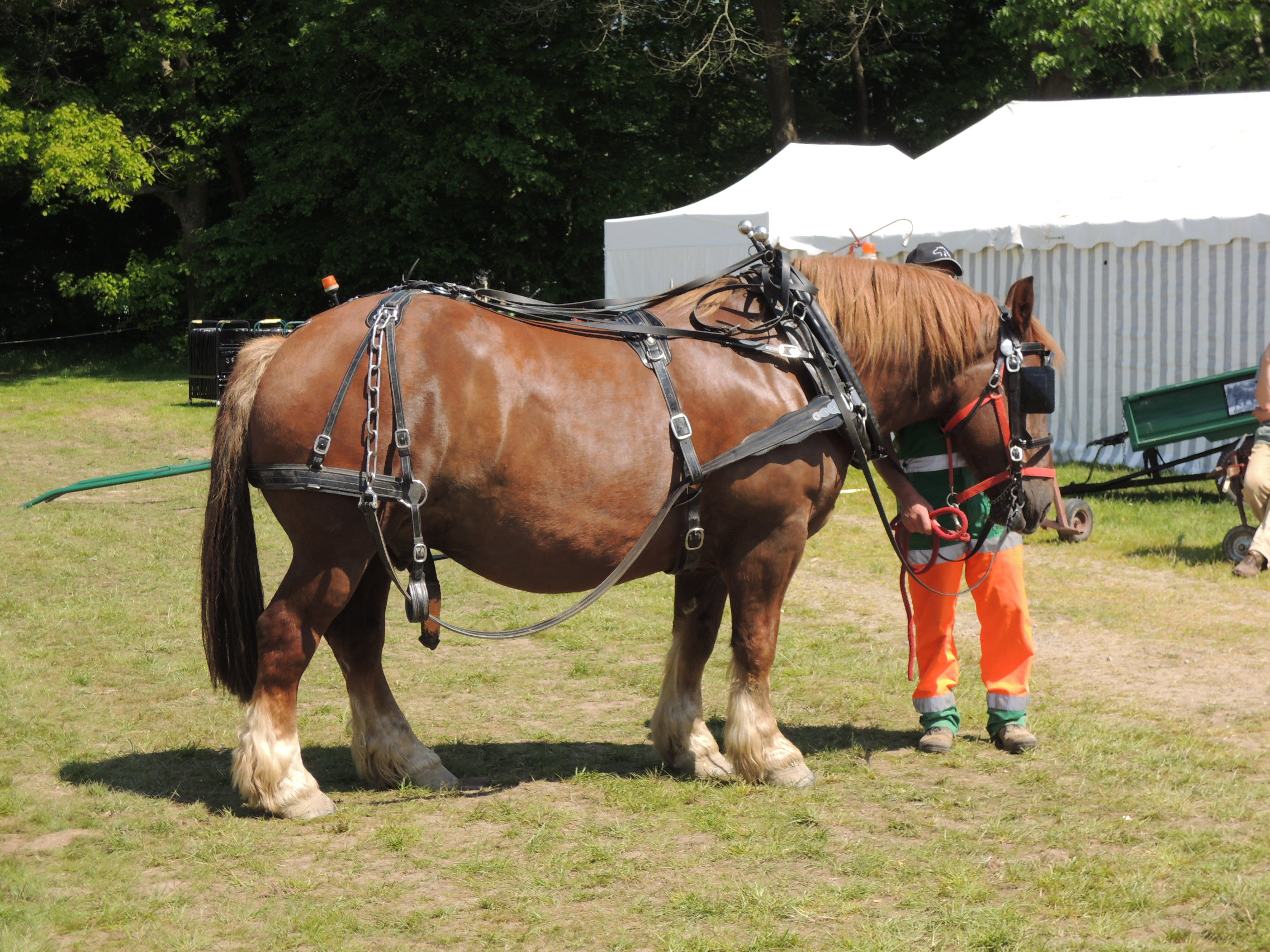 Salon du cheval au travail 2014 à Rennes. Présentation de Touzic ar Maner, cheval breton utilisé pour l'entretien du parc de Gayeulles.